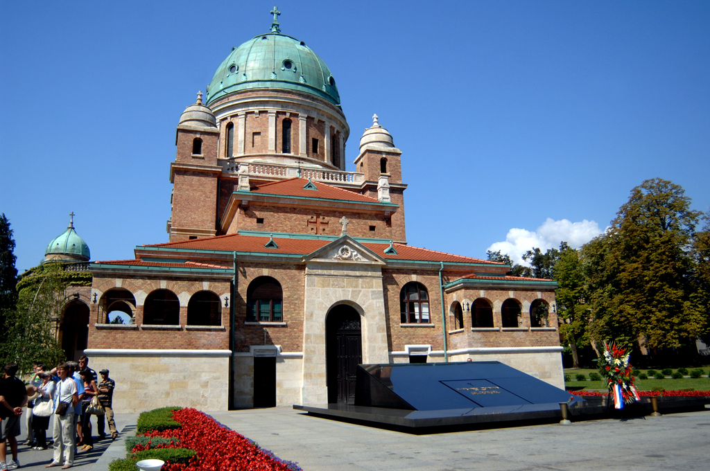 Zagreb